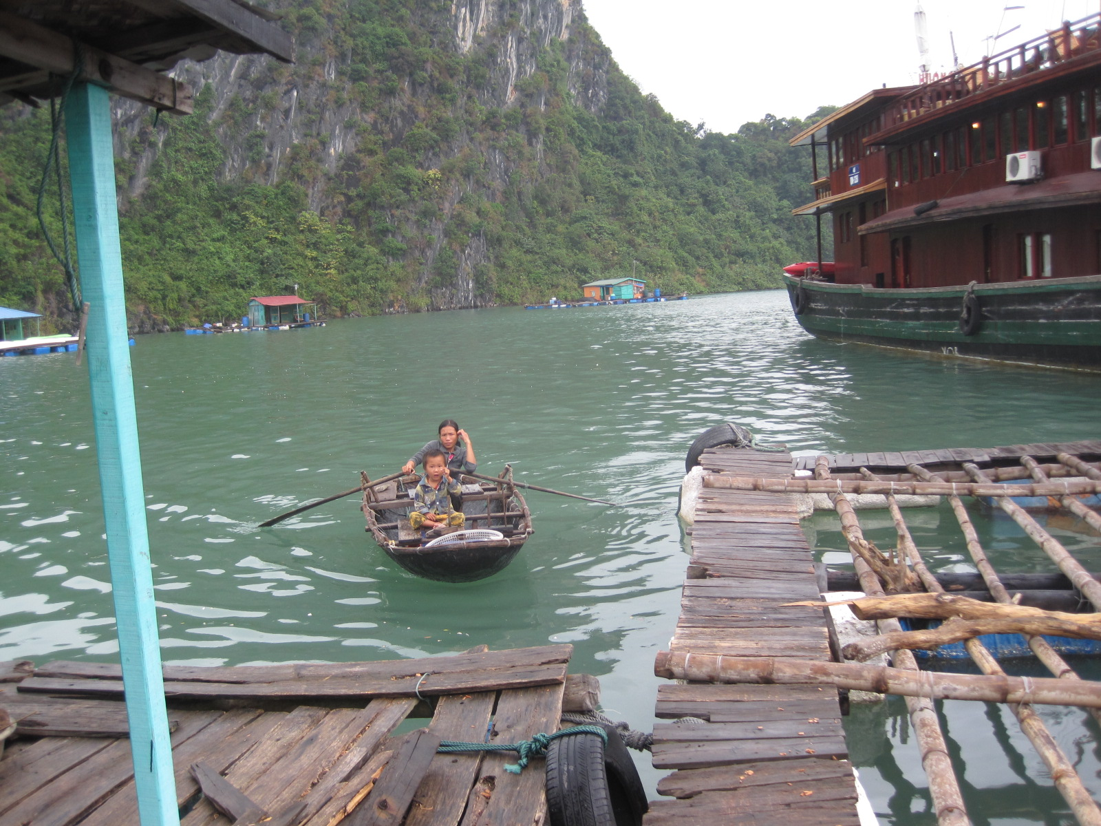 Halong Bay floating village